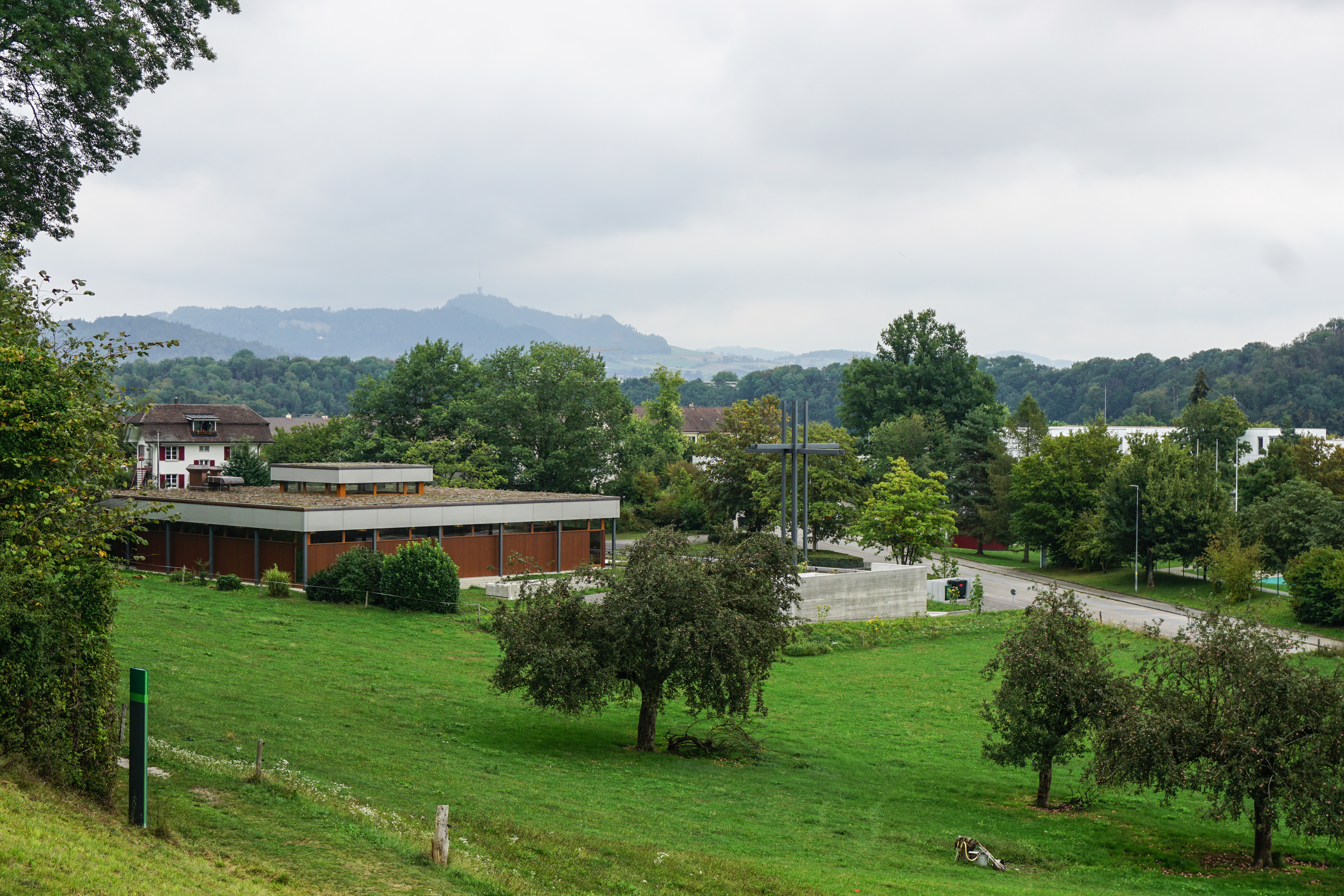 Johanneszentrum Bremgarten bei Bern von NW mit Bantiger im Hintergrund